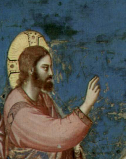 Detalle de Cristo en la Resurrección de Lázaro de la capilla de los Scrovegni en Padua. Italia